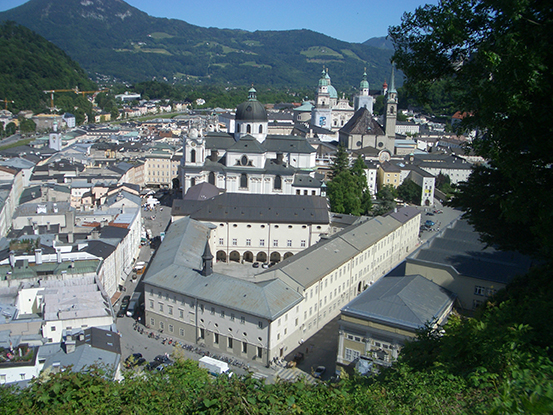 Ansicht der Salzburger Altstadt vom Mönchsberg; im Vordergrund Gebäude der Universität Salzburg (Theologische Fakultät, Universitätsbibliothek), zuvor Sitz des Akademischen Gymnasiums Salzburg